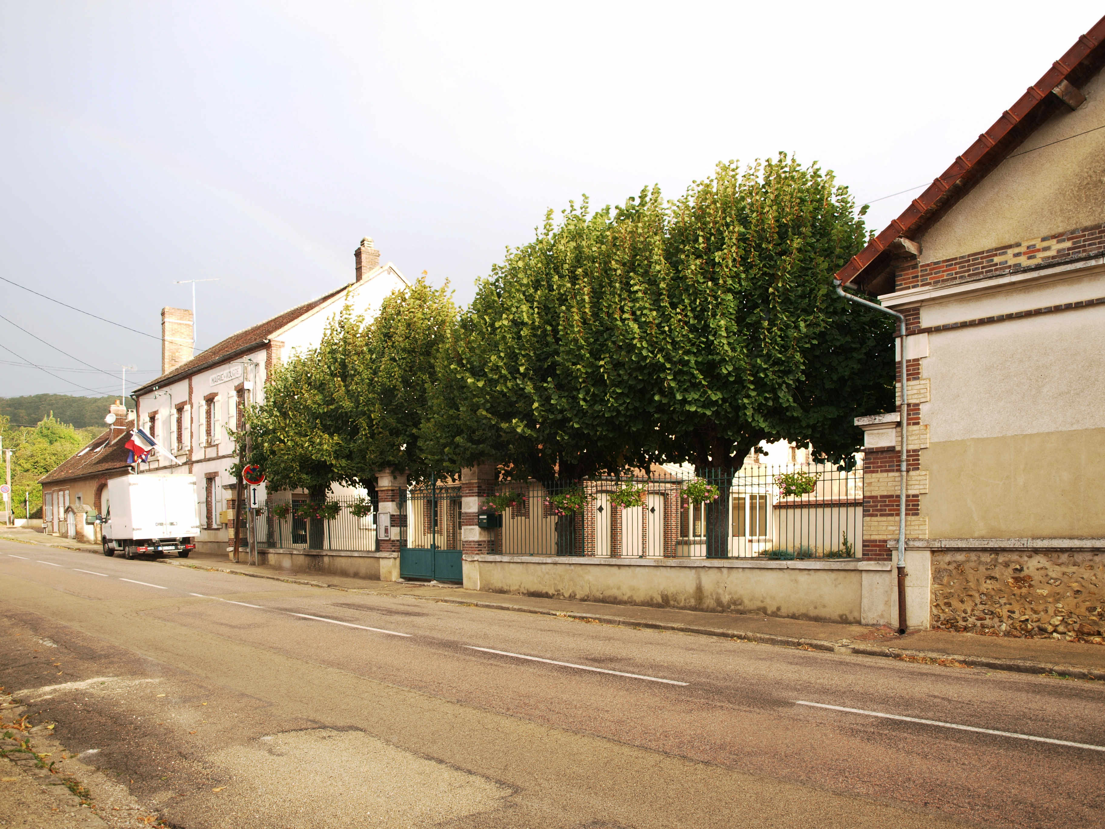 Volgré (Yonne, France) ; mairie-école.